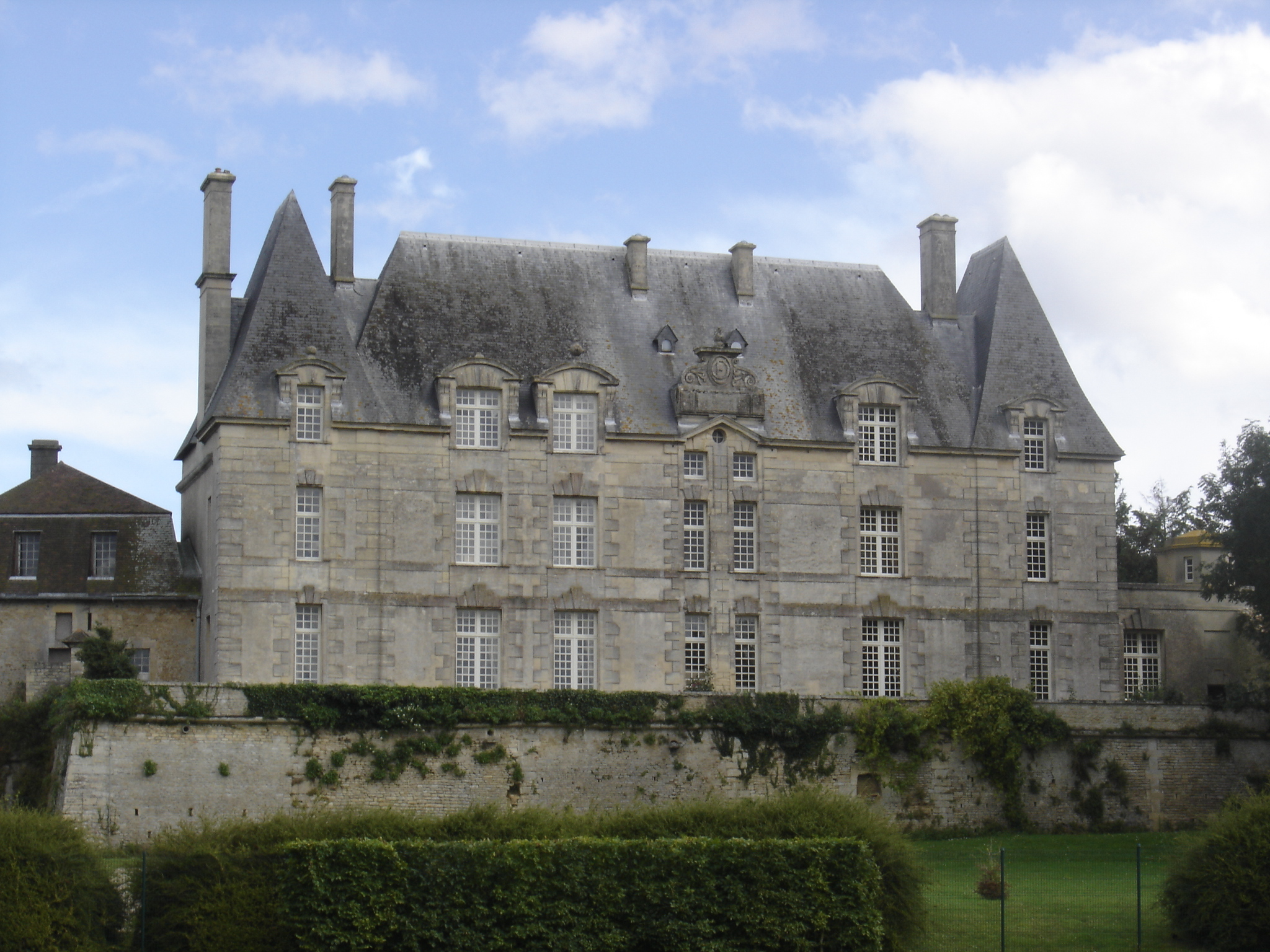 Château de Courseulles-sur-Mer, (Classé, 1910) château du XVIIè siècle éclairé de hautes fenêtres et de lucarnes richement décorées .